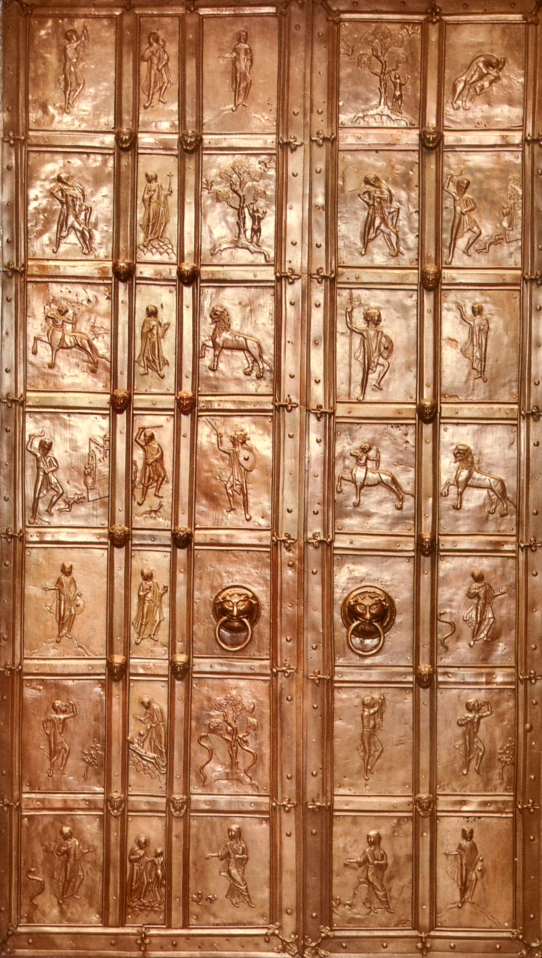 Bronzetür_Augsburger_Dom_Gesamtansicht